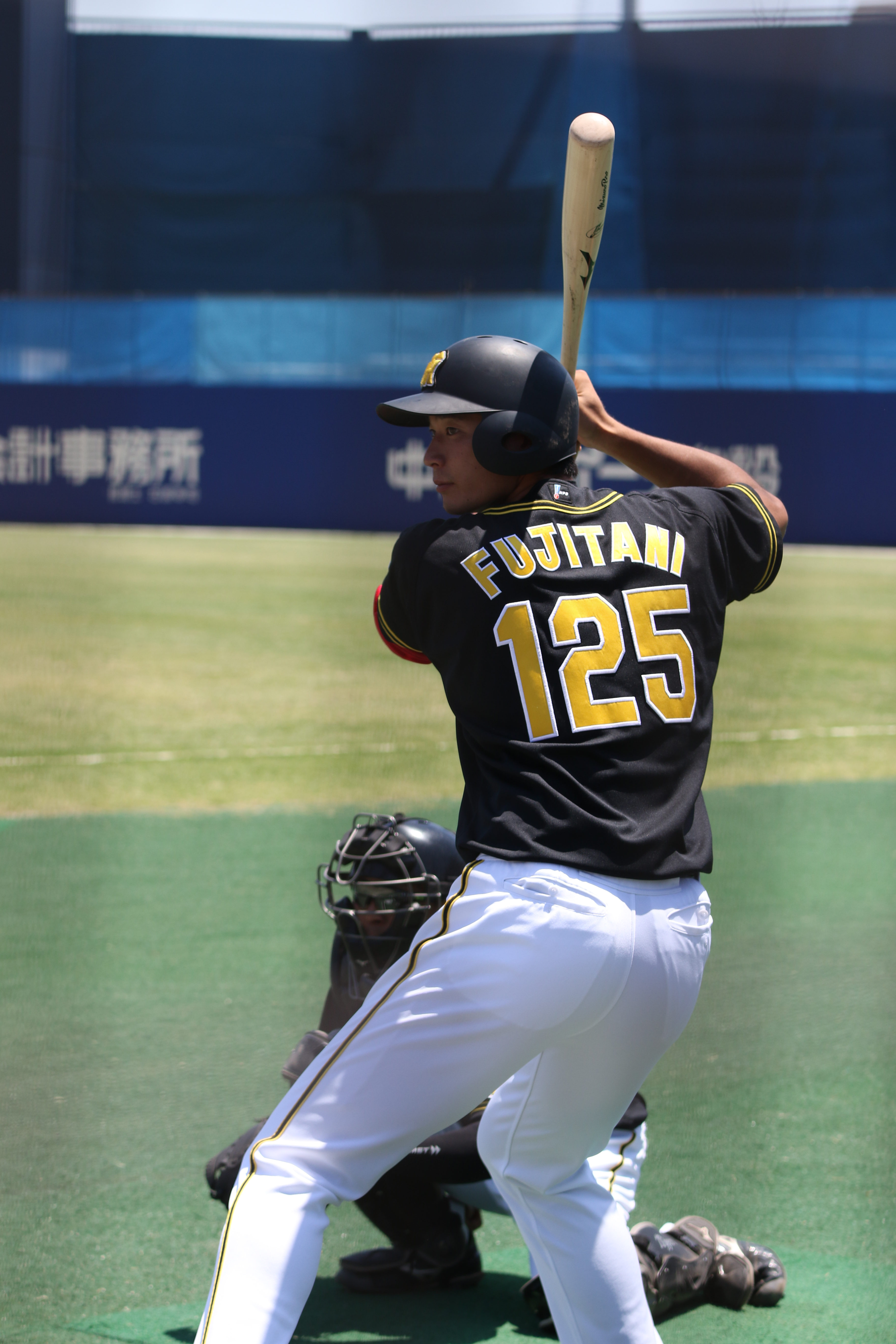 2019年5月25日、ナゴヤ球場